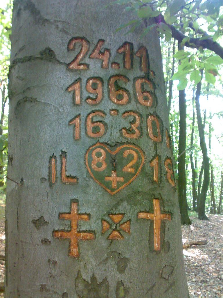 Vytesané datum na stromě - datum letu. Detail vytesaného nápisu 82 obětem tragédie z roku 1966.